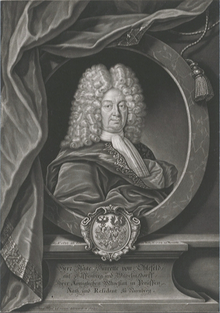 Isaak Buirette von Oehlefeld (geboren 1638 – gestorben 1708). Herr auf Hassenberg und Wilhelmsdorf, mit seinem Familienwappen. Rat des Königs in Preußen und Resident zu Nürnberg.